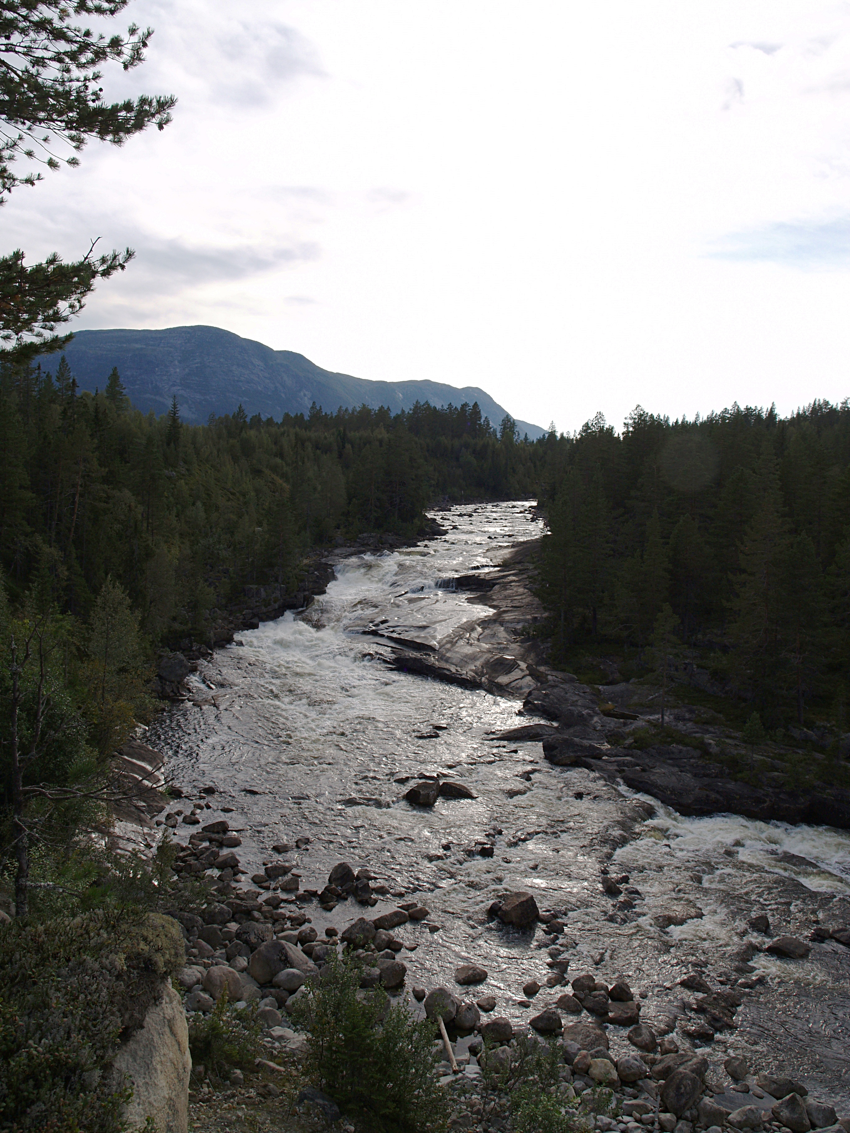 Aurdøla